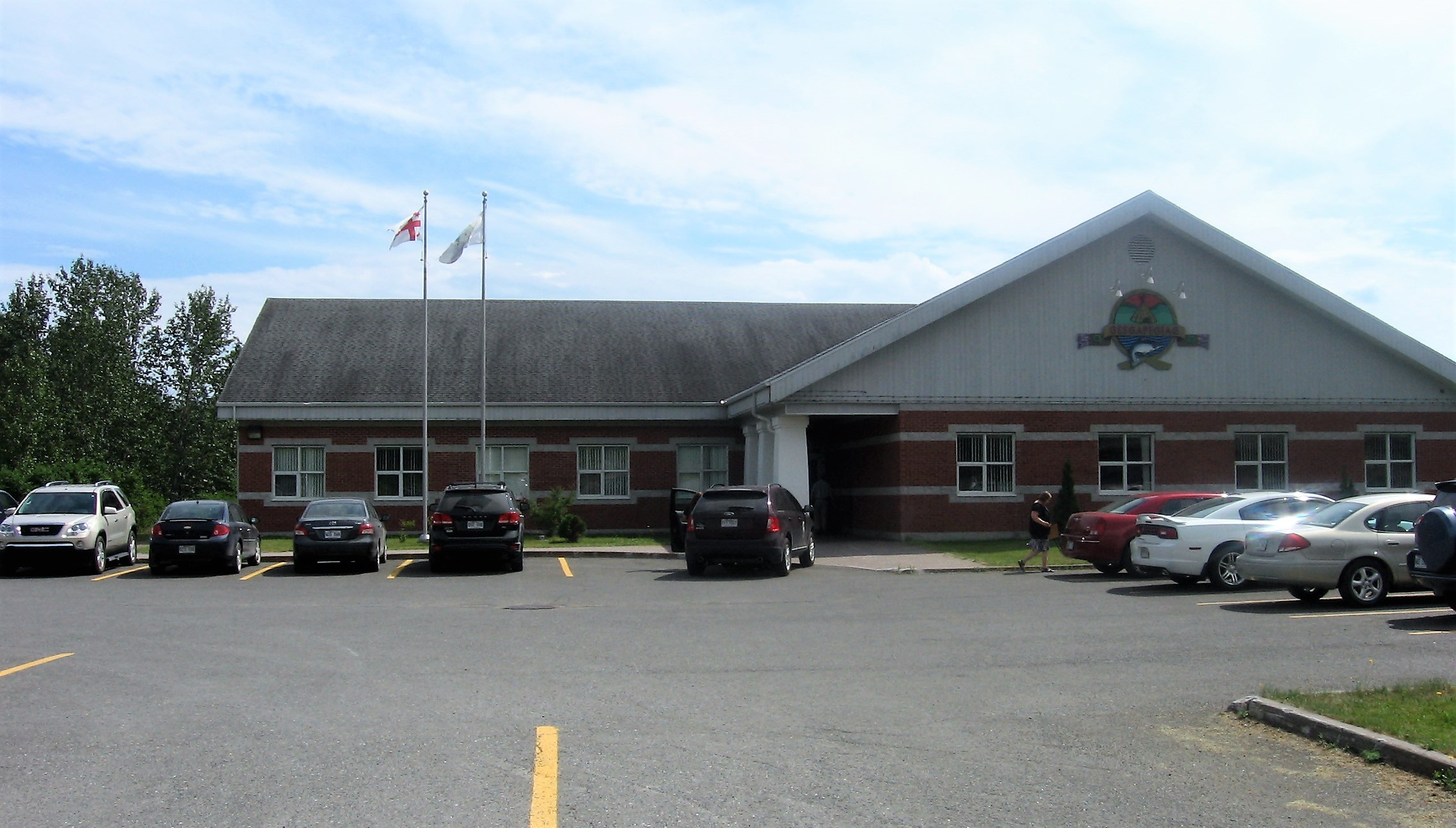 Village Micmac de Gesgapegiag